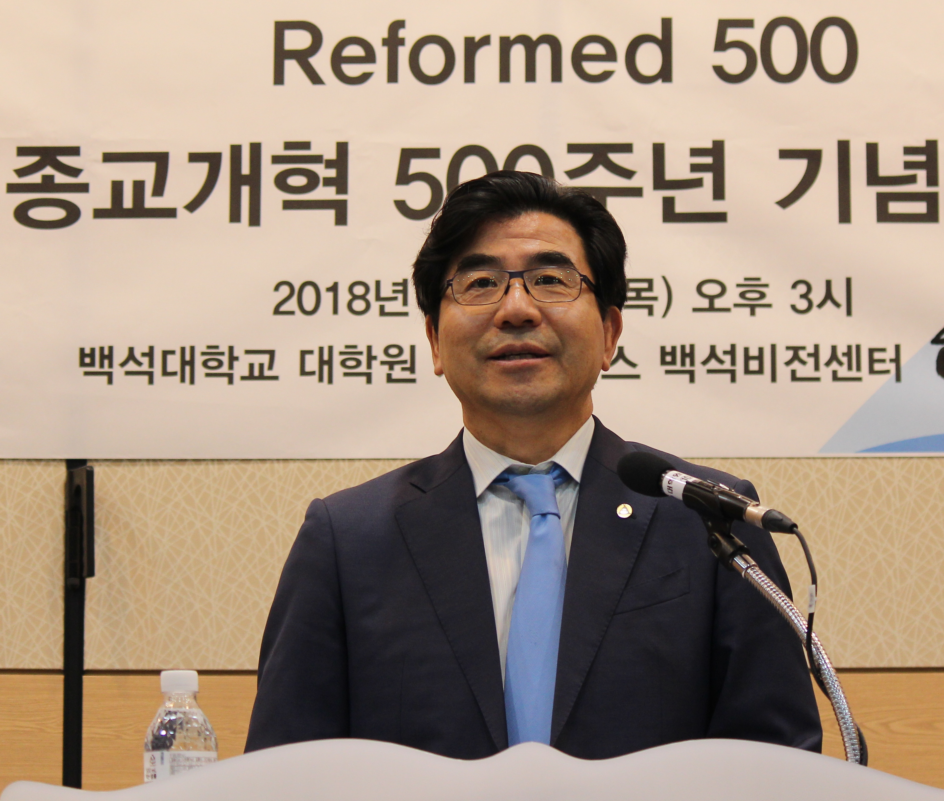 주도홍 박사 스위스종교개혁500주년대회 대회장